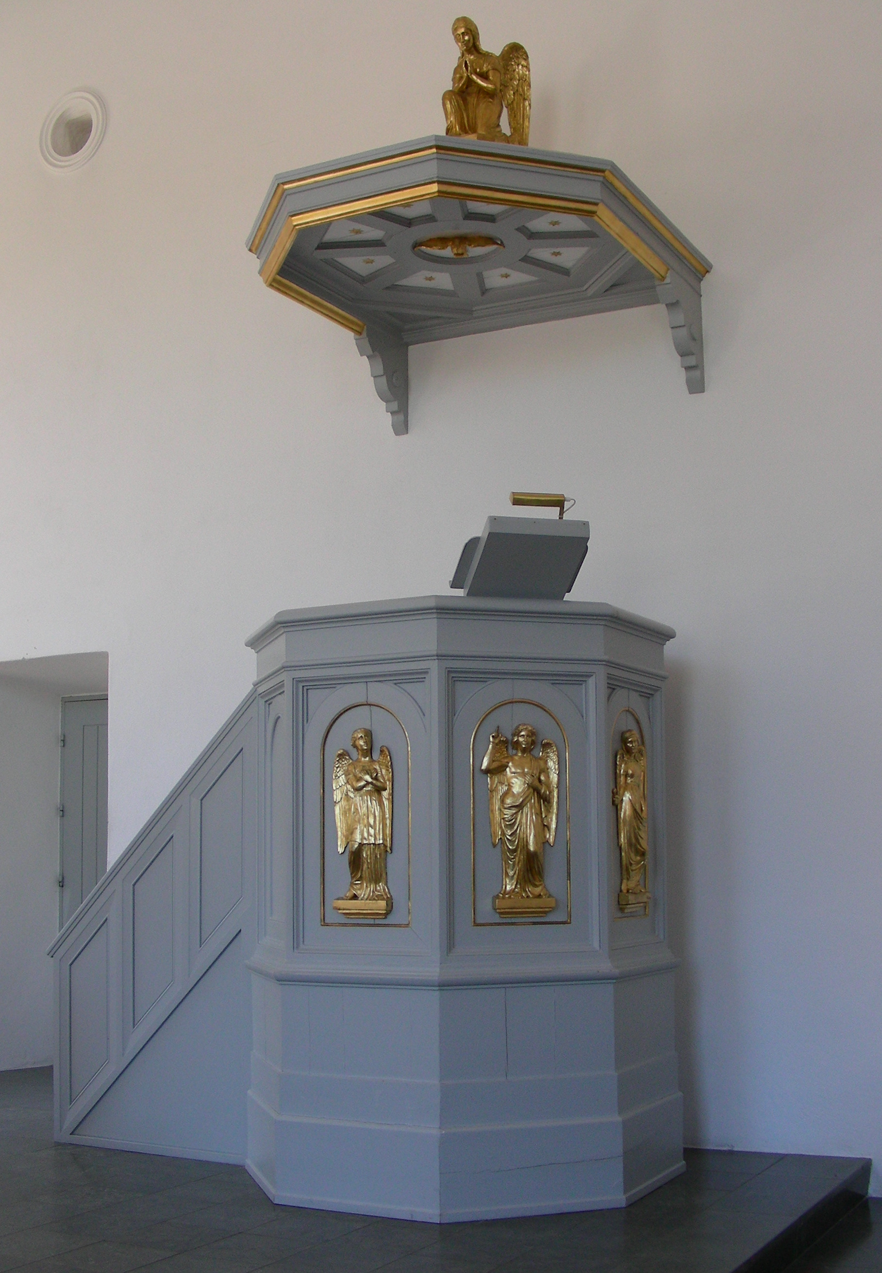 Kastelskirken (Citadel Church), Copenhagen, Denmark. Pulpit.